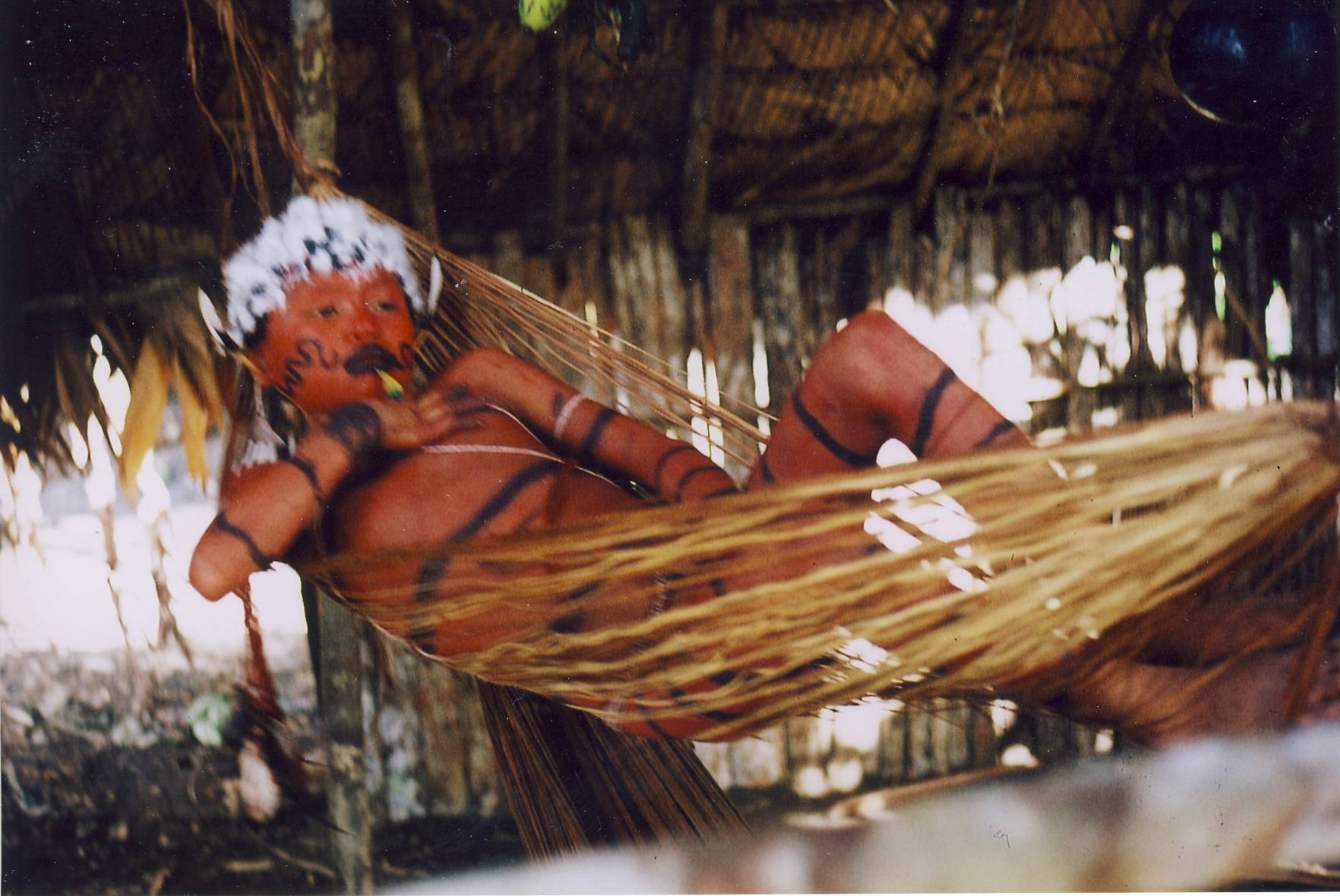 Waikajunge in hamaca